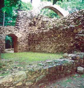 Zona Arqueológica Oxtankah, Quintana Roo